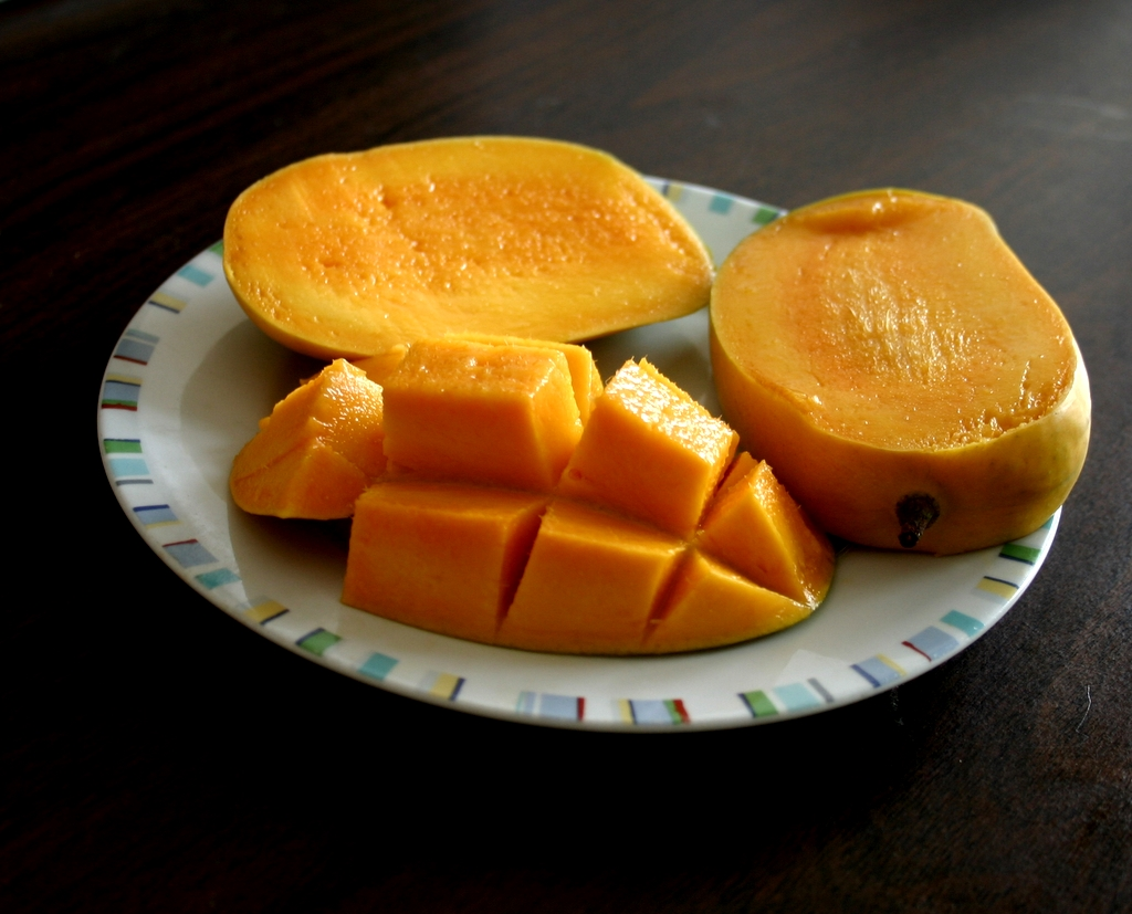 Mango fruit. Kesar variety, India